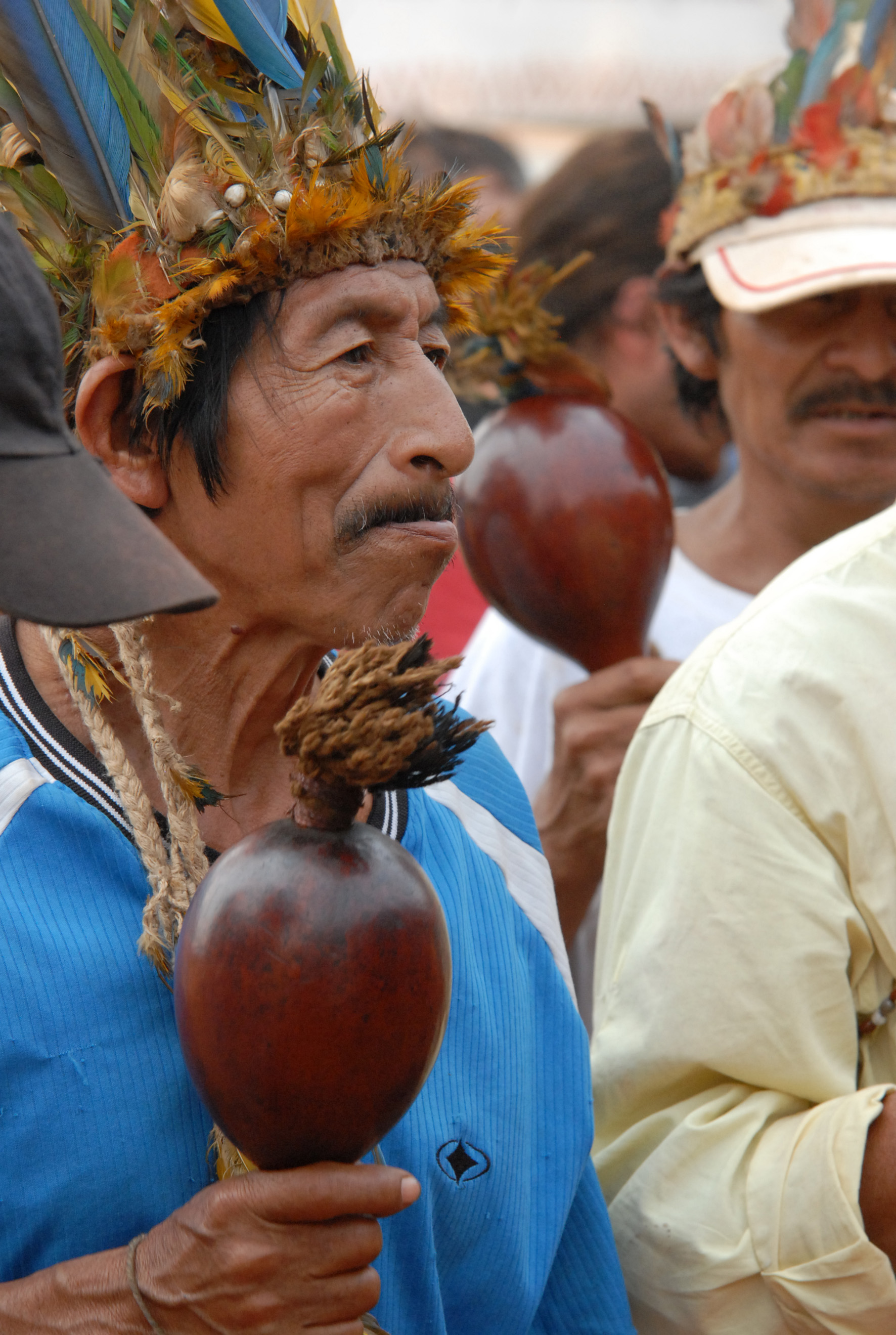 Caarapó (MS) - Xamãs guarani, na dança que marcou a despedida do encontro de lideranças para lançamento da campanha "Povo Guarani, Grande Povo!" Foto: Roosewelt Pinheiro/ABr